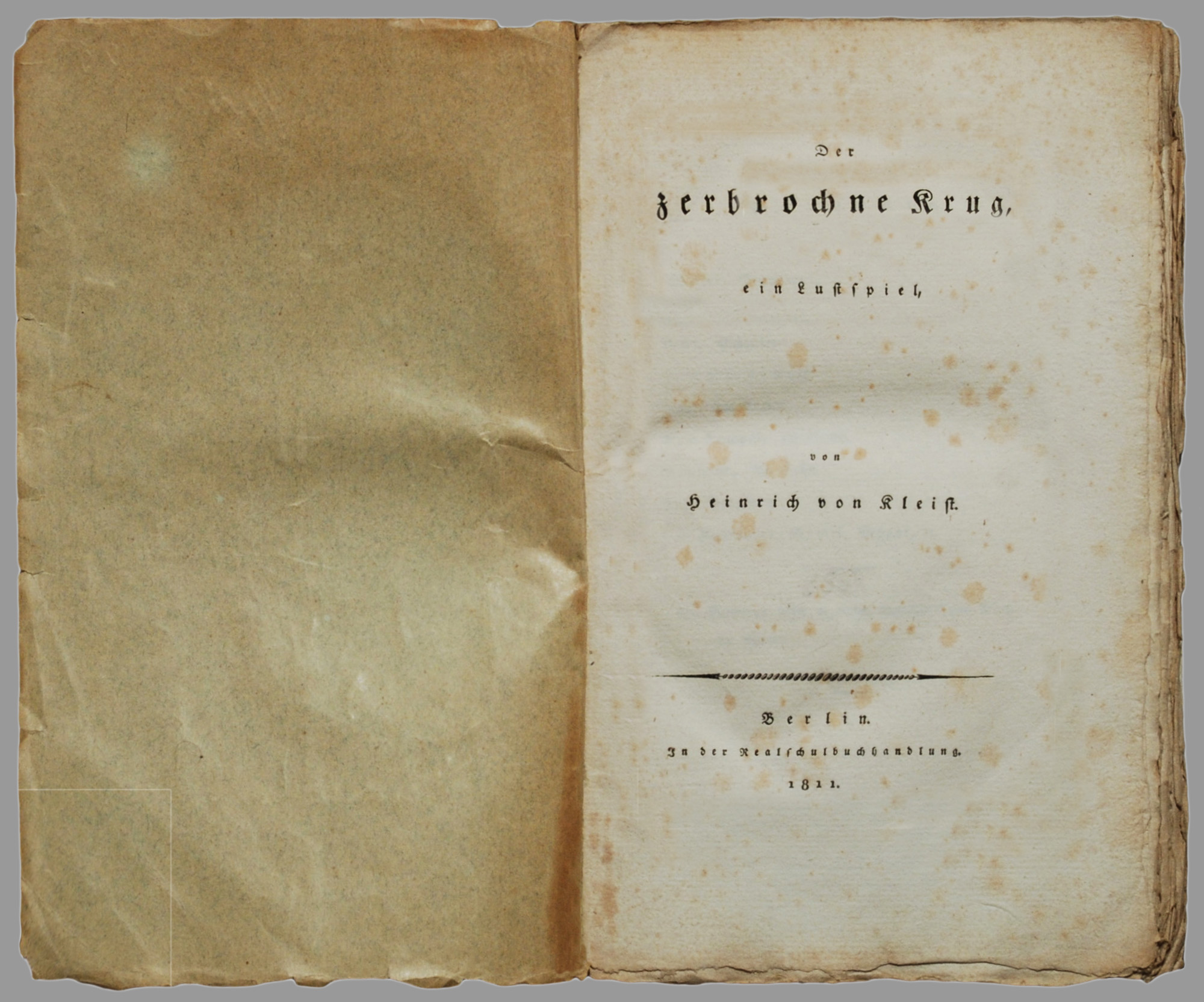 Der zerbrochne Krug, ein Lustspiel von Heinrich von Kleist. Berlin: Realschulbuchhandlung 1811, 174 Seiten; erste Buchausgabe, Wilpert/Gühring² 8; Original-Interimsbroschur (ca. 22 x 13,5 cm), unbeschnitten